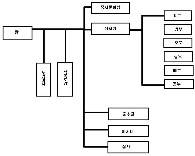 고려 행정조직